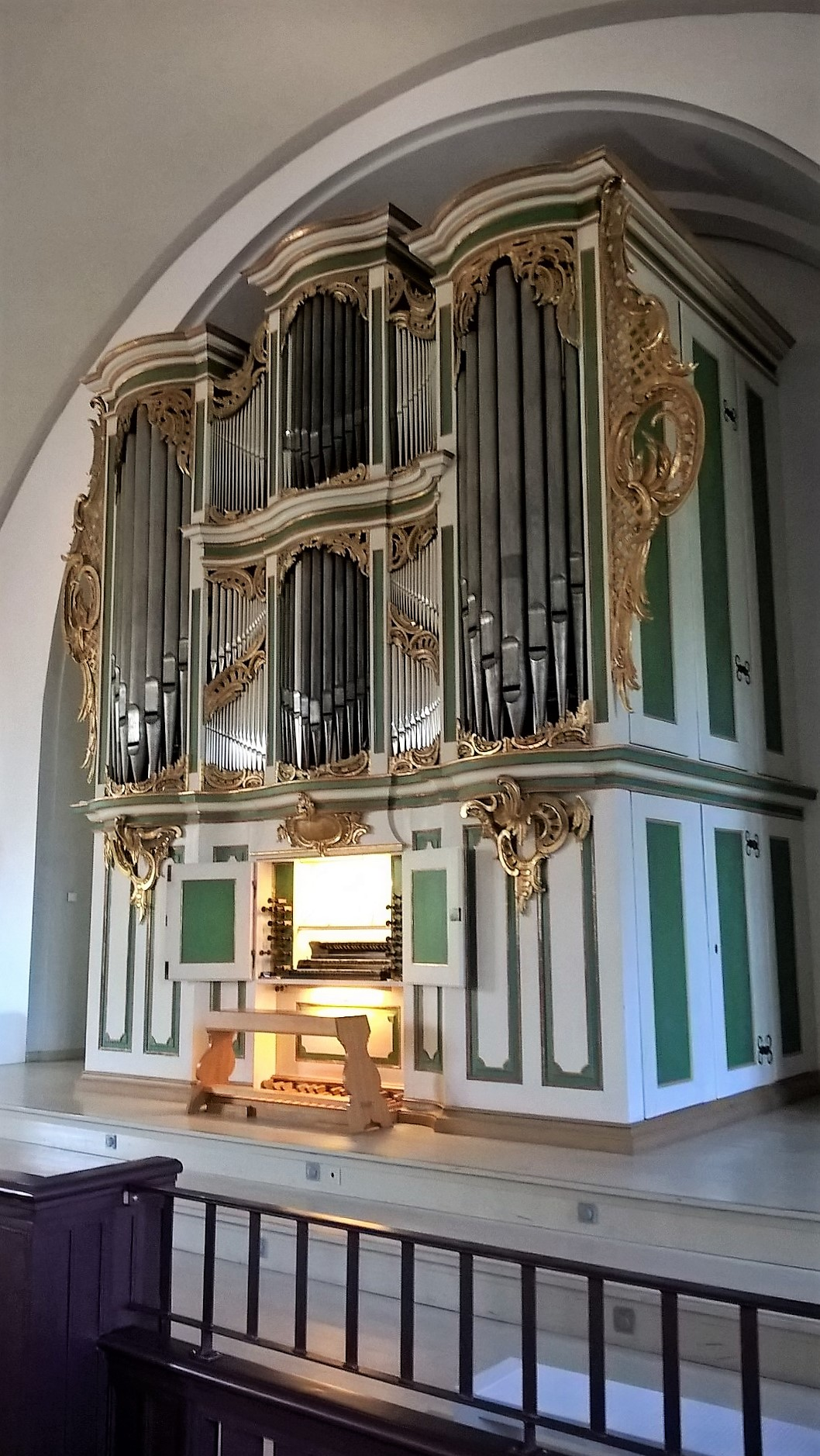 Orgel der Kirche Zur Frohen Botschaft, Berlin-Karlshorst, Deutschland